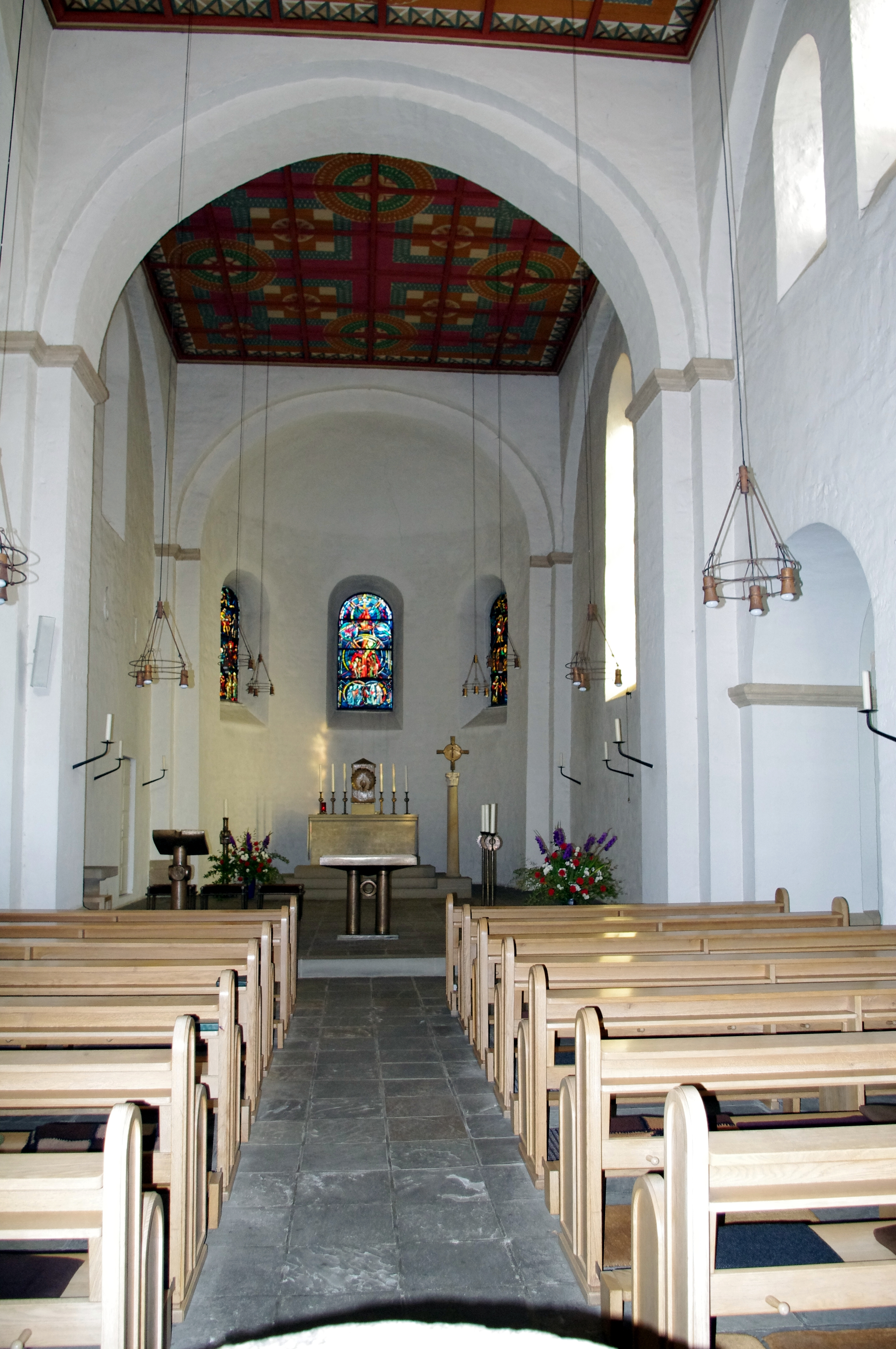 Blick in den Altarraum der Stiftskirche Stoppenberg